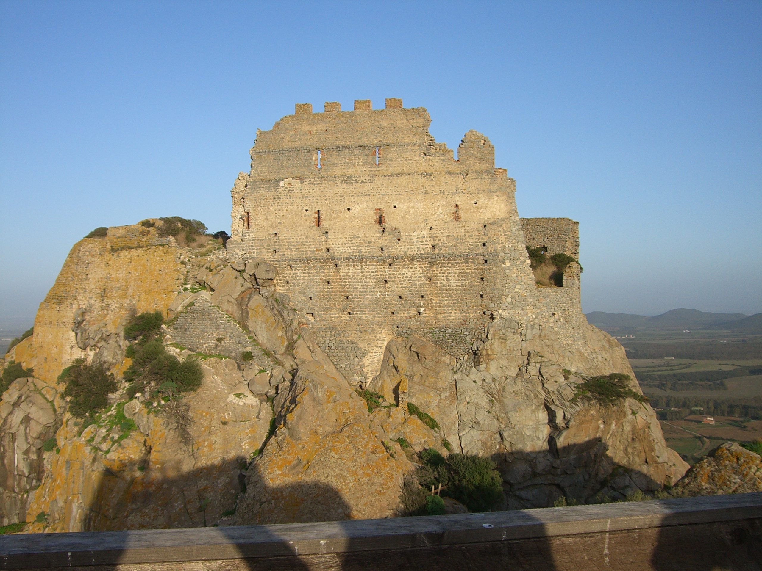 Rovine del castello di Acquafredda presso Siliqua (CA) , divenne proprietà del conte Ugolino Della Gherardesca nel 1257